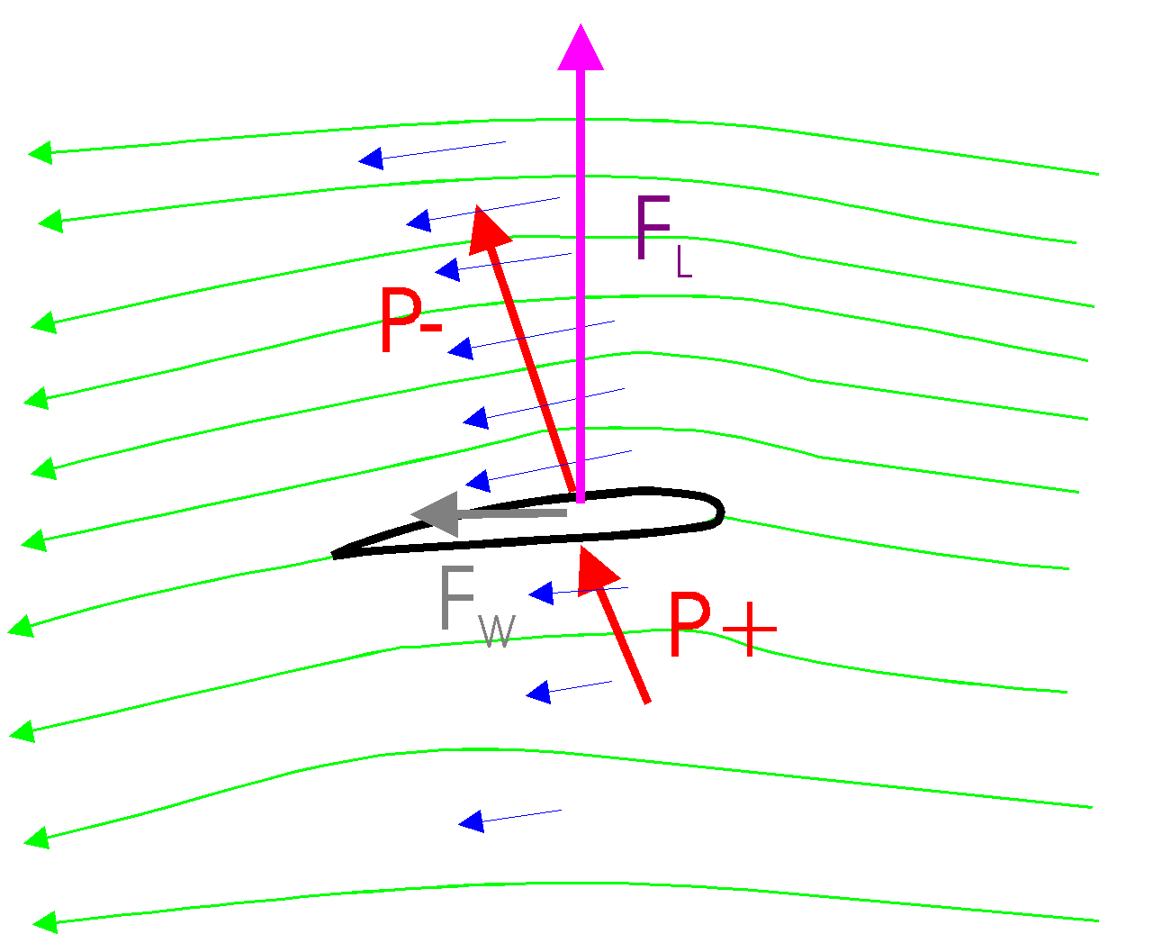 luchtstroming vliegtuigvleugel